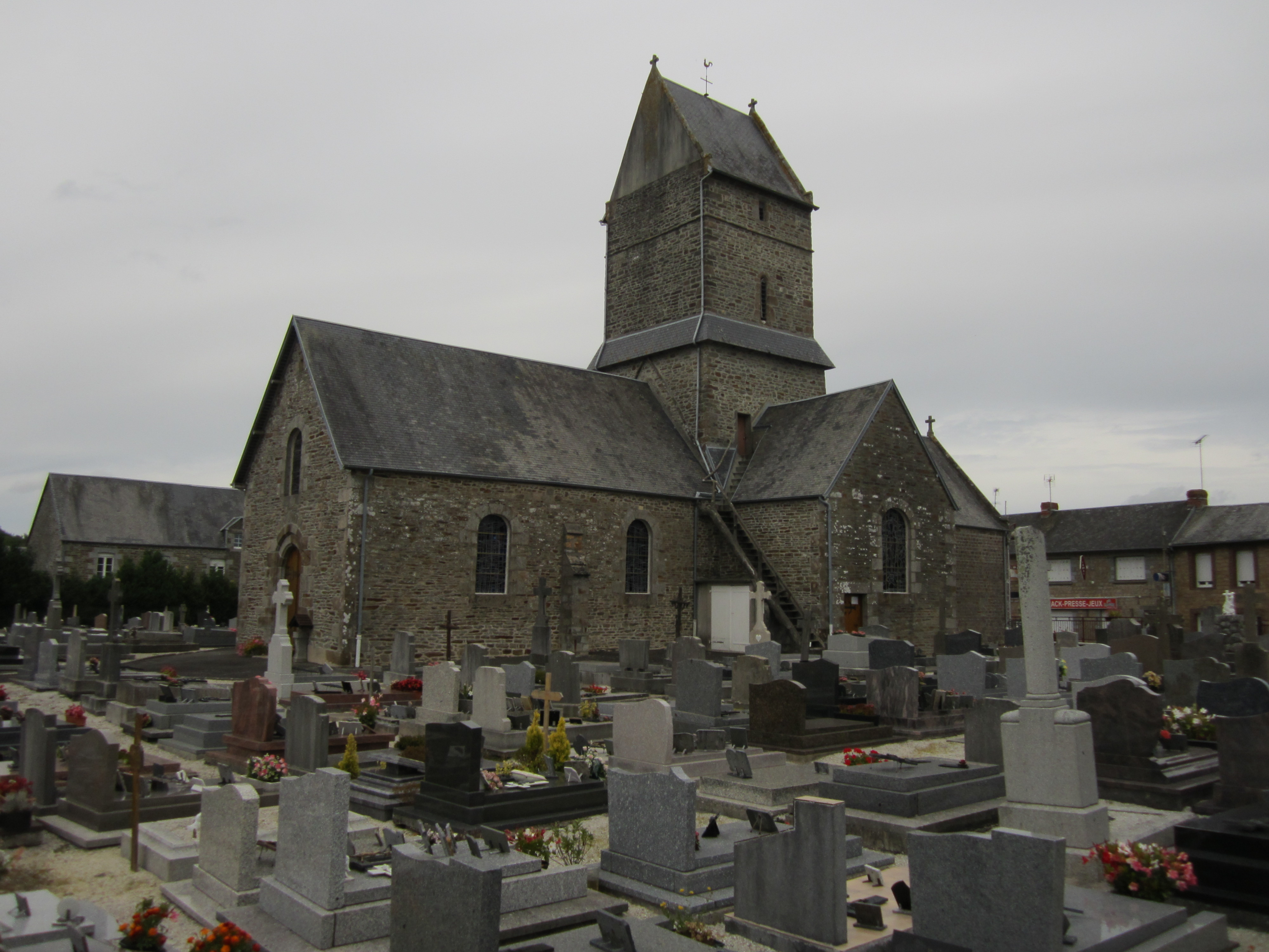 Folligny, Manche